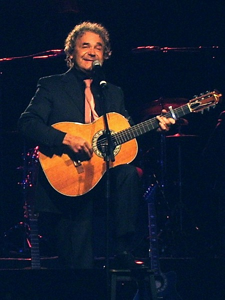 Pierre Perret au Festival de la chanson française de Lormes (Nièvre, France).